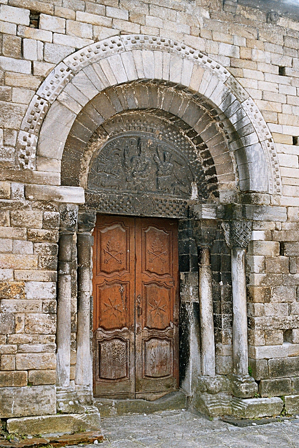 Espagne - Val d'Aran - Église de l'Assomption de Bossòst